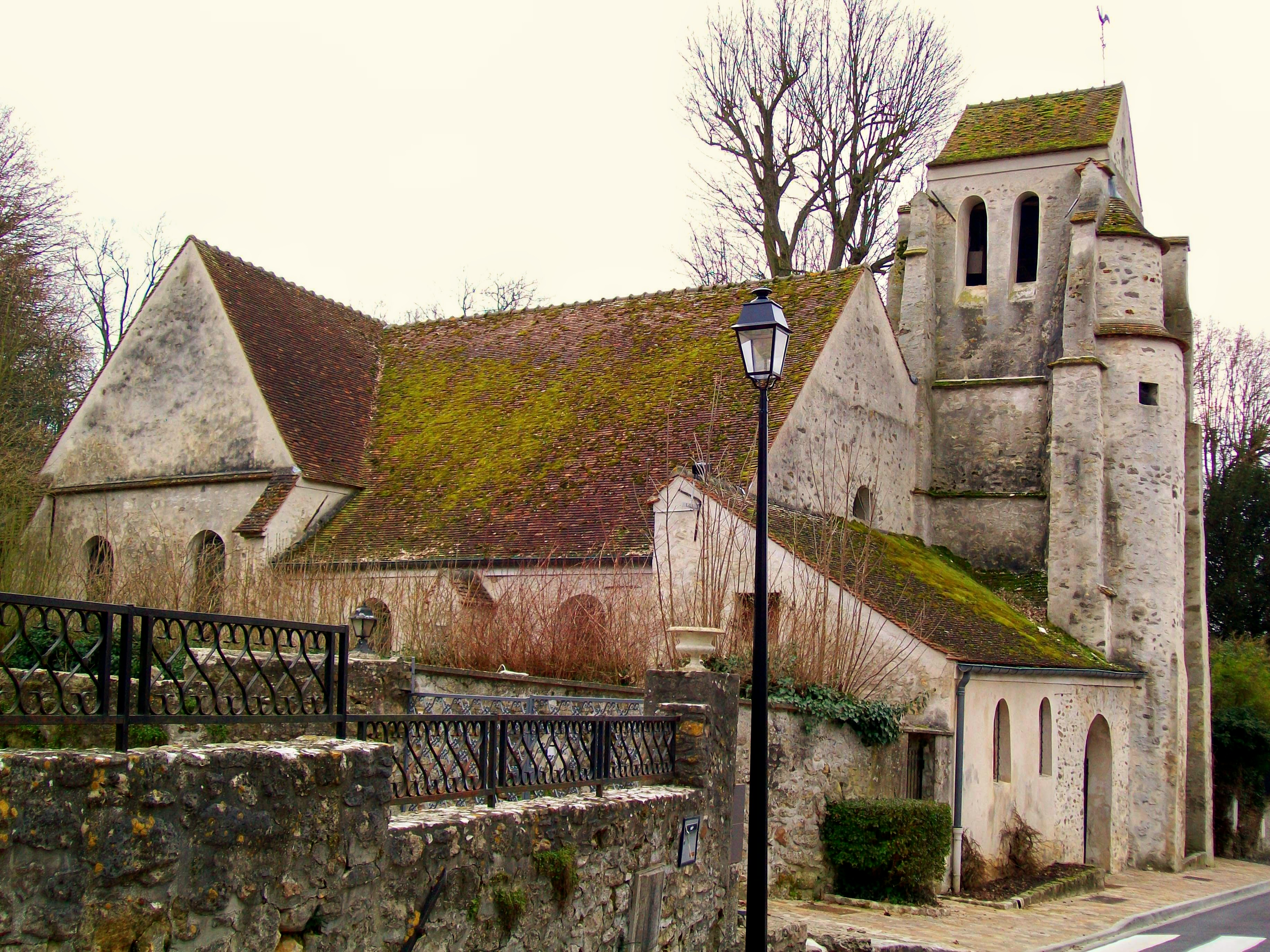 L'église Saint-Nicolas, dont la nef a été en partie reconstruite et agrandie au XVIe siècle.